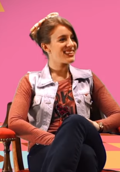 Laura Esquivel en una entrevista en 2017